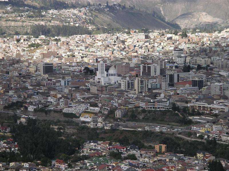 Blick auf das Zentrum von Ambato